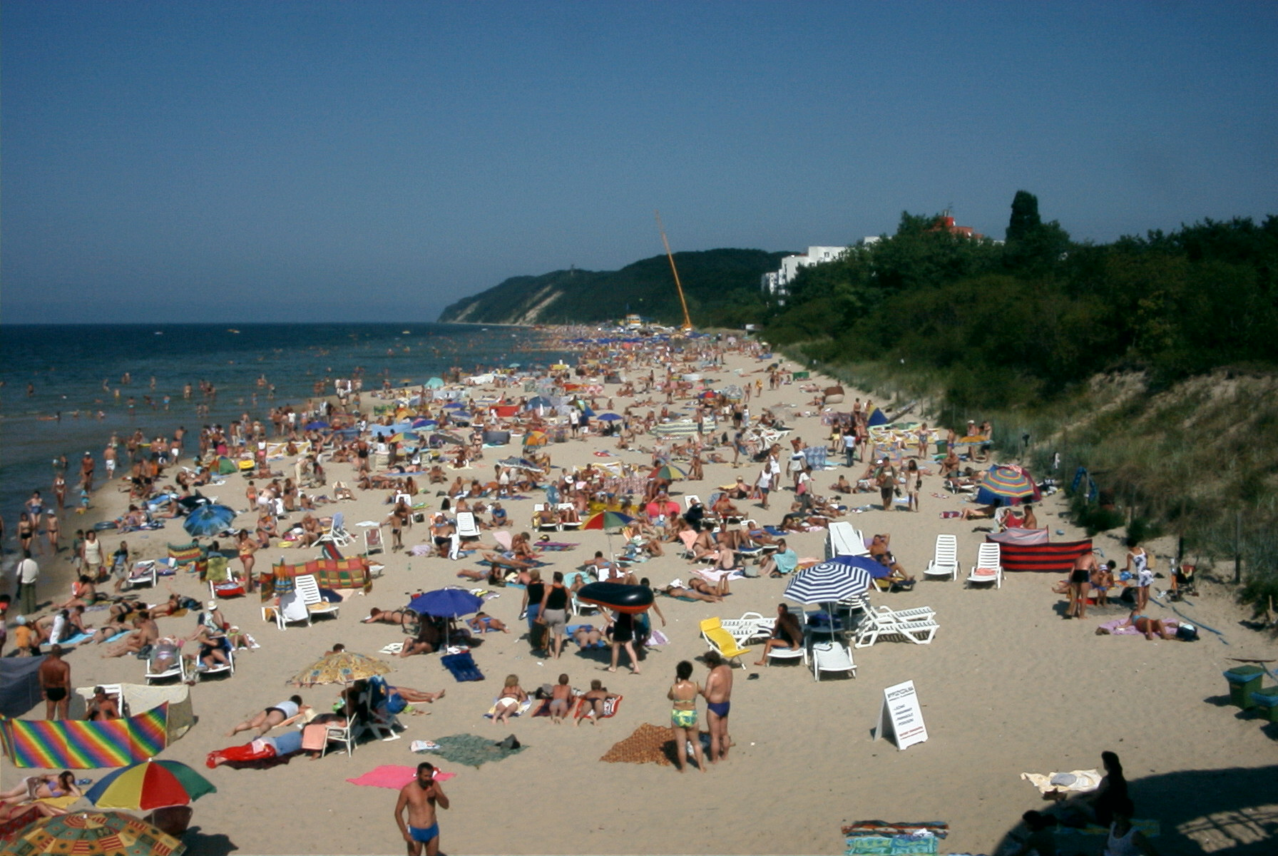 Strand von Misdroy, Hintergrund Gosan-Berg